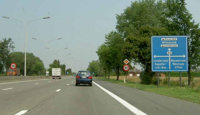 L'autoroute A12 belge en direction de Willebroek